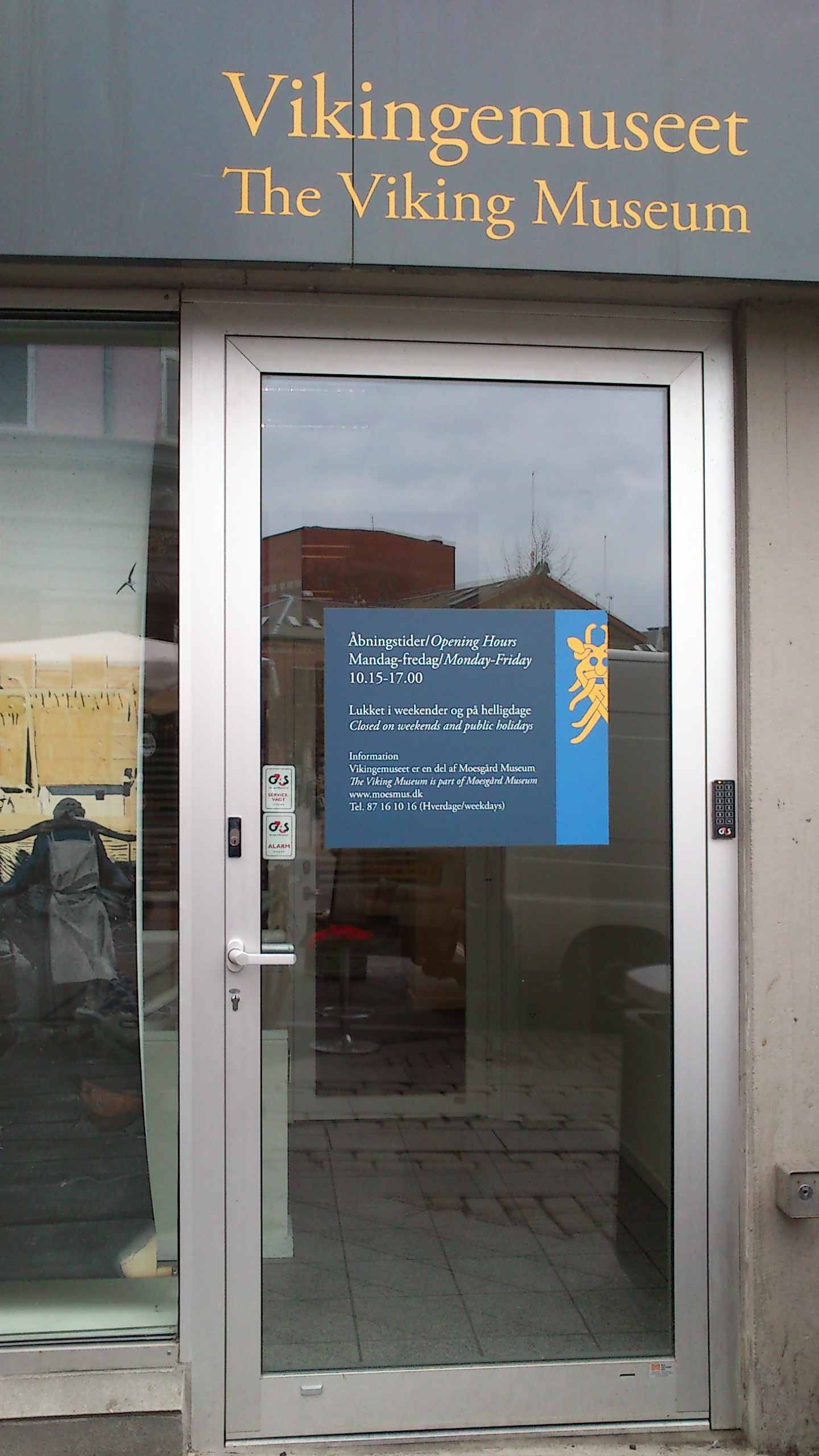 Vikingemuseet i Århus.